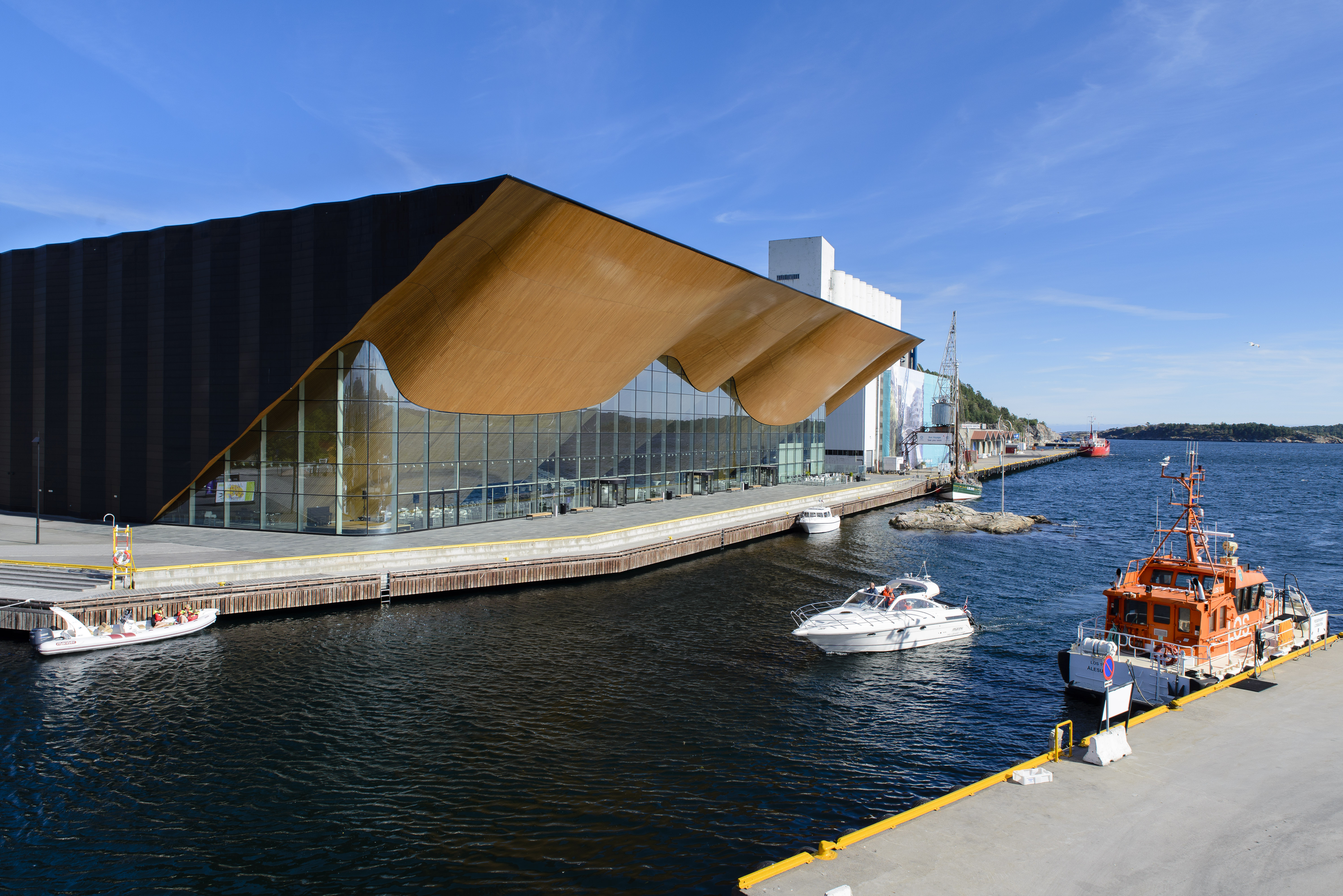 Kilden konsert og teaterhus, Kristiansand